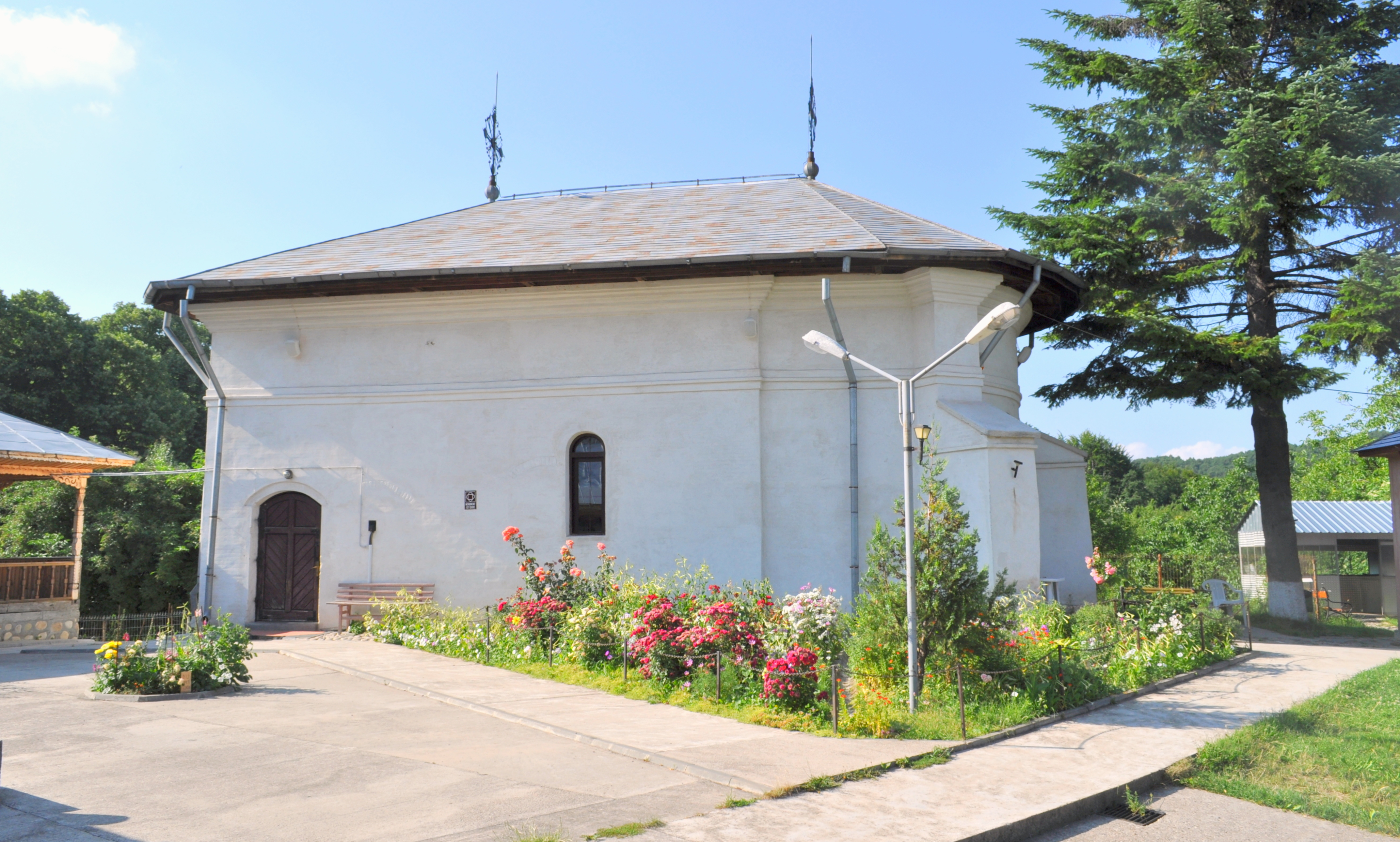 Mănăstirea Dălhăuți, Vrancea 02